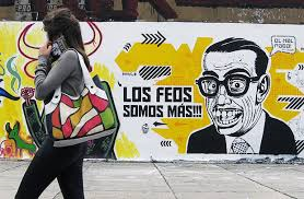 Los Feos Somos Mas, graffiti de Toxicómano (en bogota)